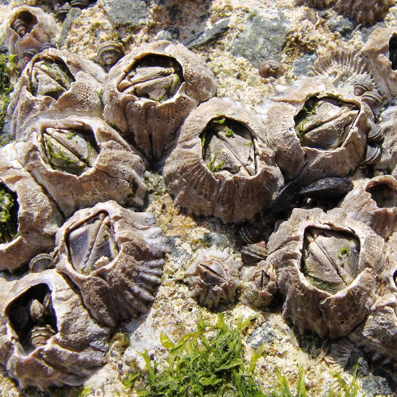 Balanus albicostatus Pilsbry(ja=シロスジフジツボ)